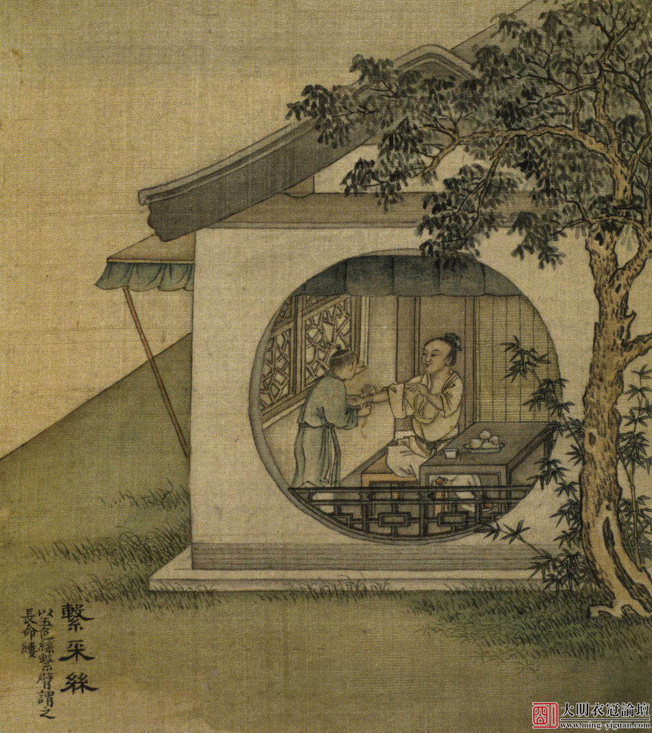 中文（香港）: 第六開〈系采絲〉：漢代以青、赤、黃、白、黑五種色彩的絲線，紮成“長命縷”，系在臂上，可以驅除瘟病、避邪止惡。